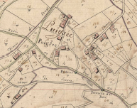 El Puig.sec de Sant Llorenç de Cerdans en el Cadastre napoleònic del 1812 (Arxius Departamentals dels Pirineus Orientals)